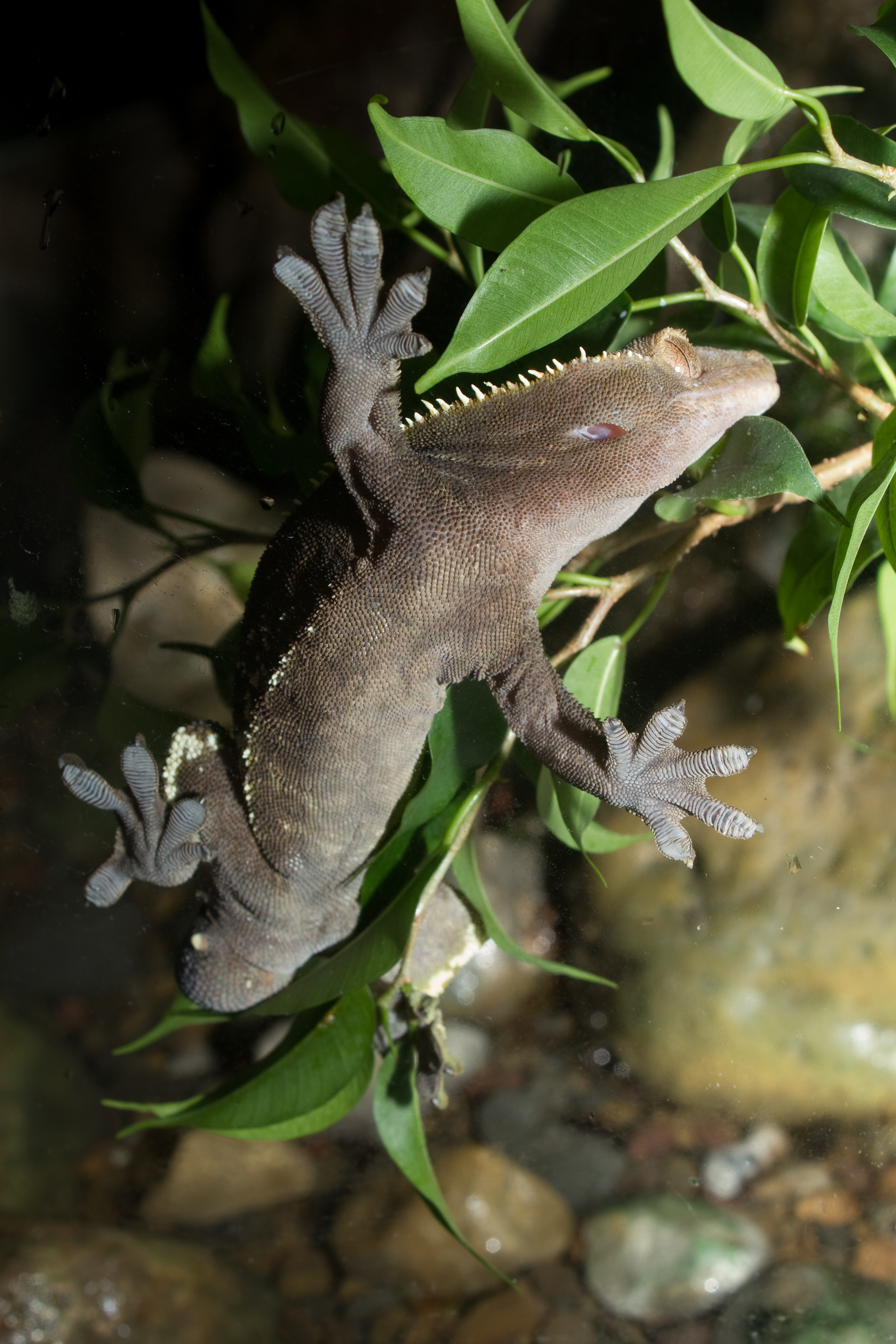 Rhacodactylus ciliatus